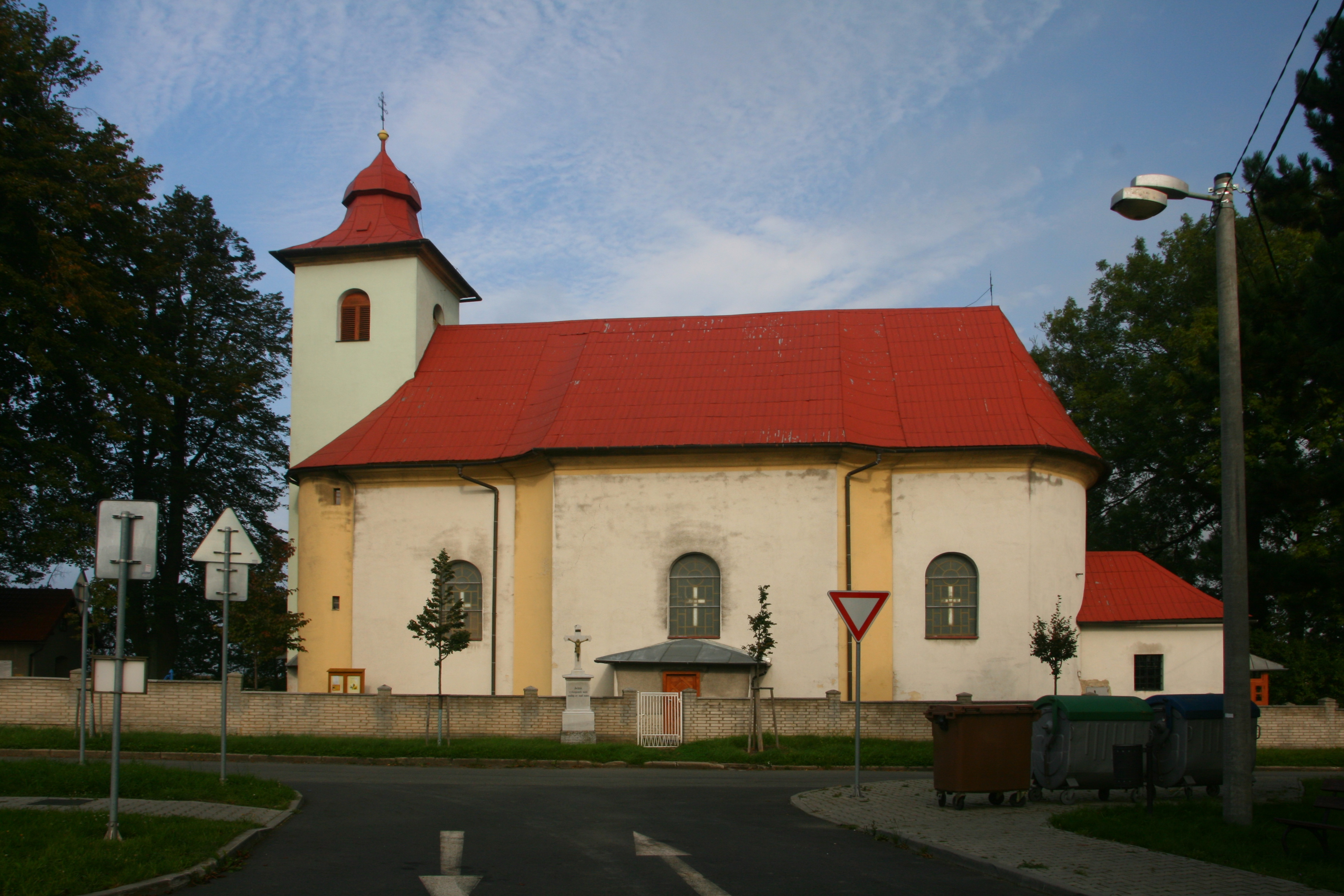 Kostel svatého Vavřince, Luboměř.